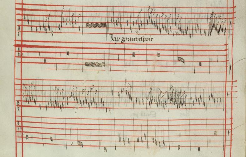 Codex Faenza